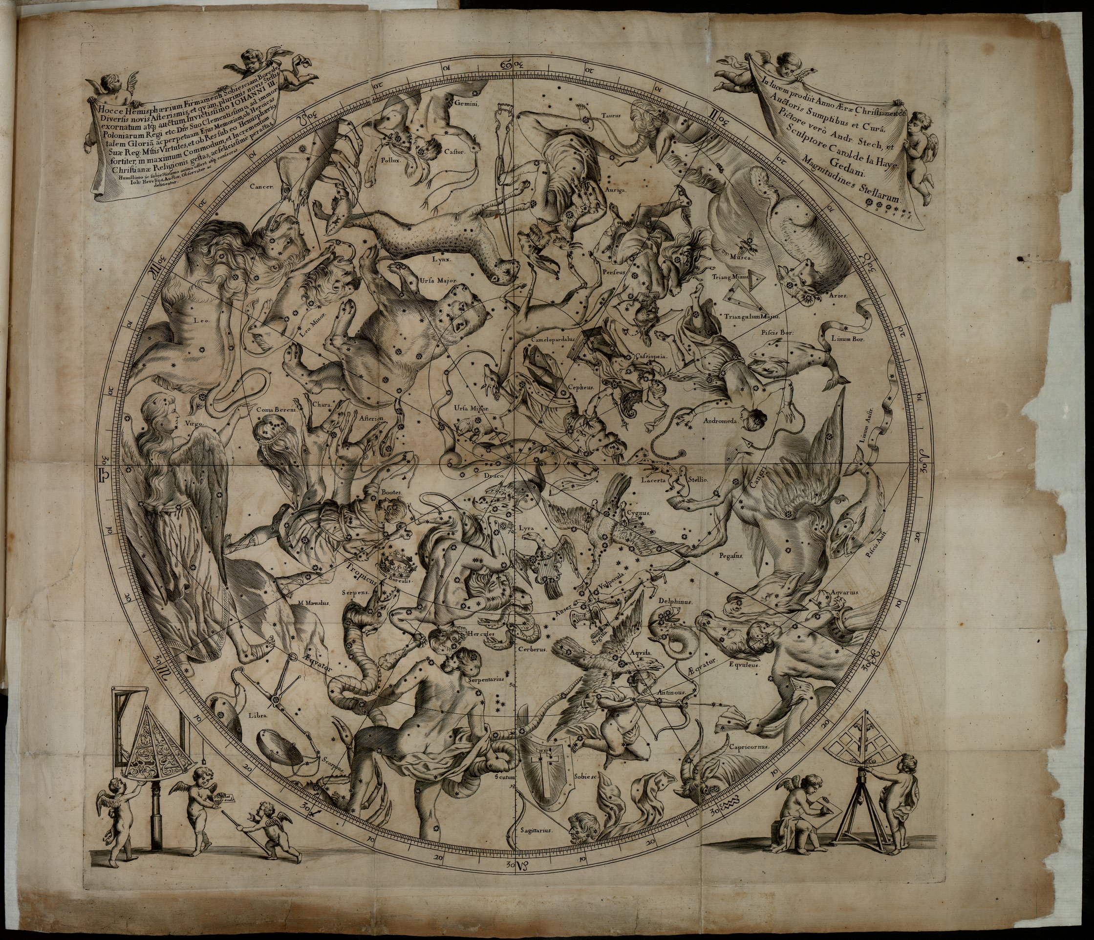 Tavola 55 del terzo volume "Firmamentum Sobiescianum, sive uranographia" dell'opera "Prodromus Astronomia" di Johannes Hevelius, pubblicato nel 1690 a Danzica. La tavola riproduce l'intero Emisfero Boreale.